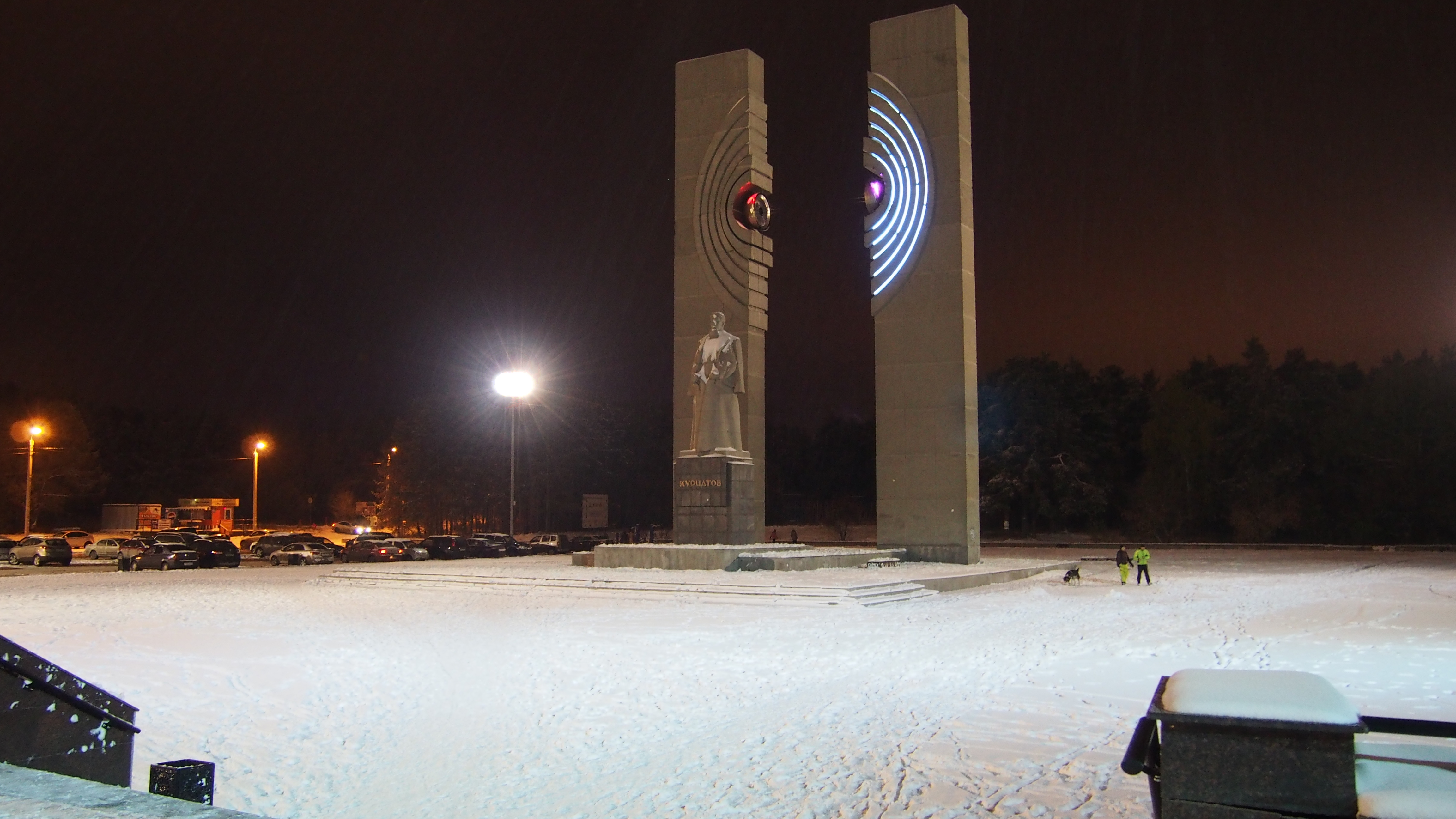 Площадь науки (Челябинск). Памятник И. В. Курчатову "Расщеплённый атом"